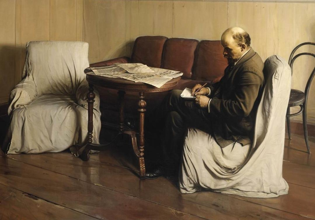 Lenin representado en el Instituto Smolny por Isaak Brodsky.